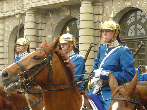 Tägliche Ablösung der schwedischen Palastwachen